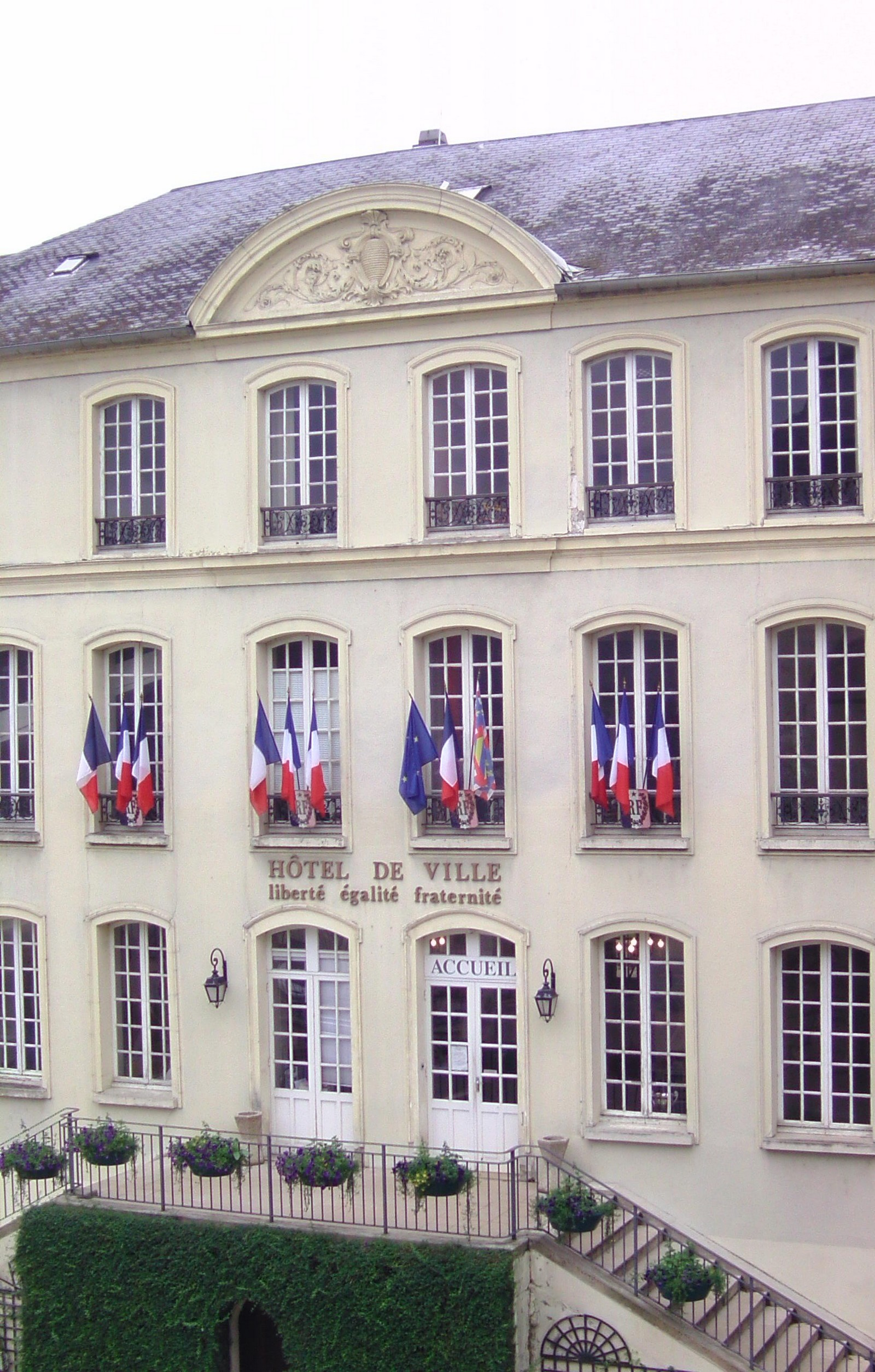 La mairie de Villeneuve sur Yonne